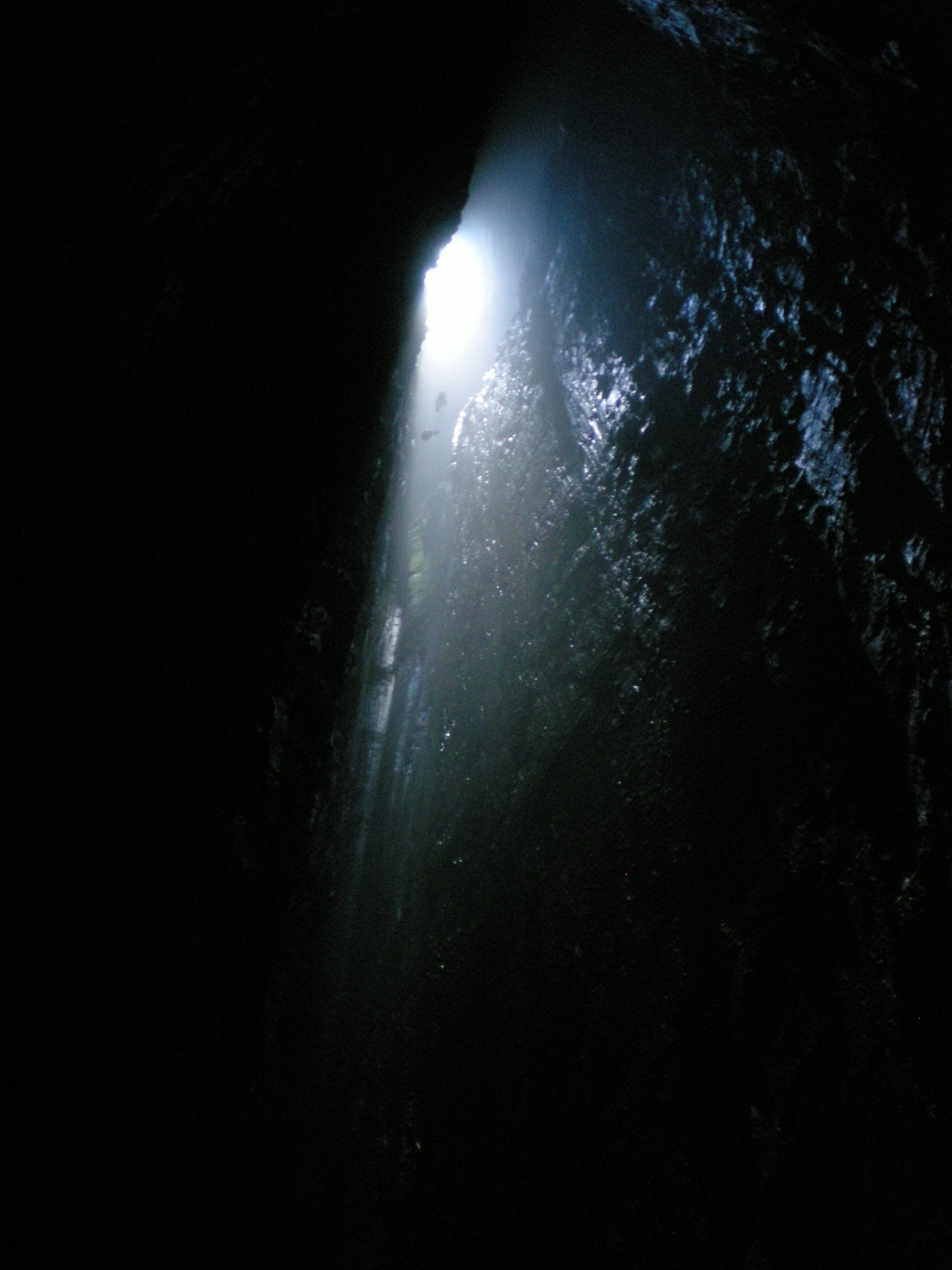 Vista della Spluga della Preta dal fondo del pozzo iniziale